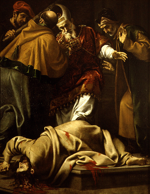 La obra representa el martirio de Santiago el Menor, uno de los doce apóstoles de Cristo.